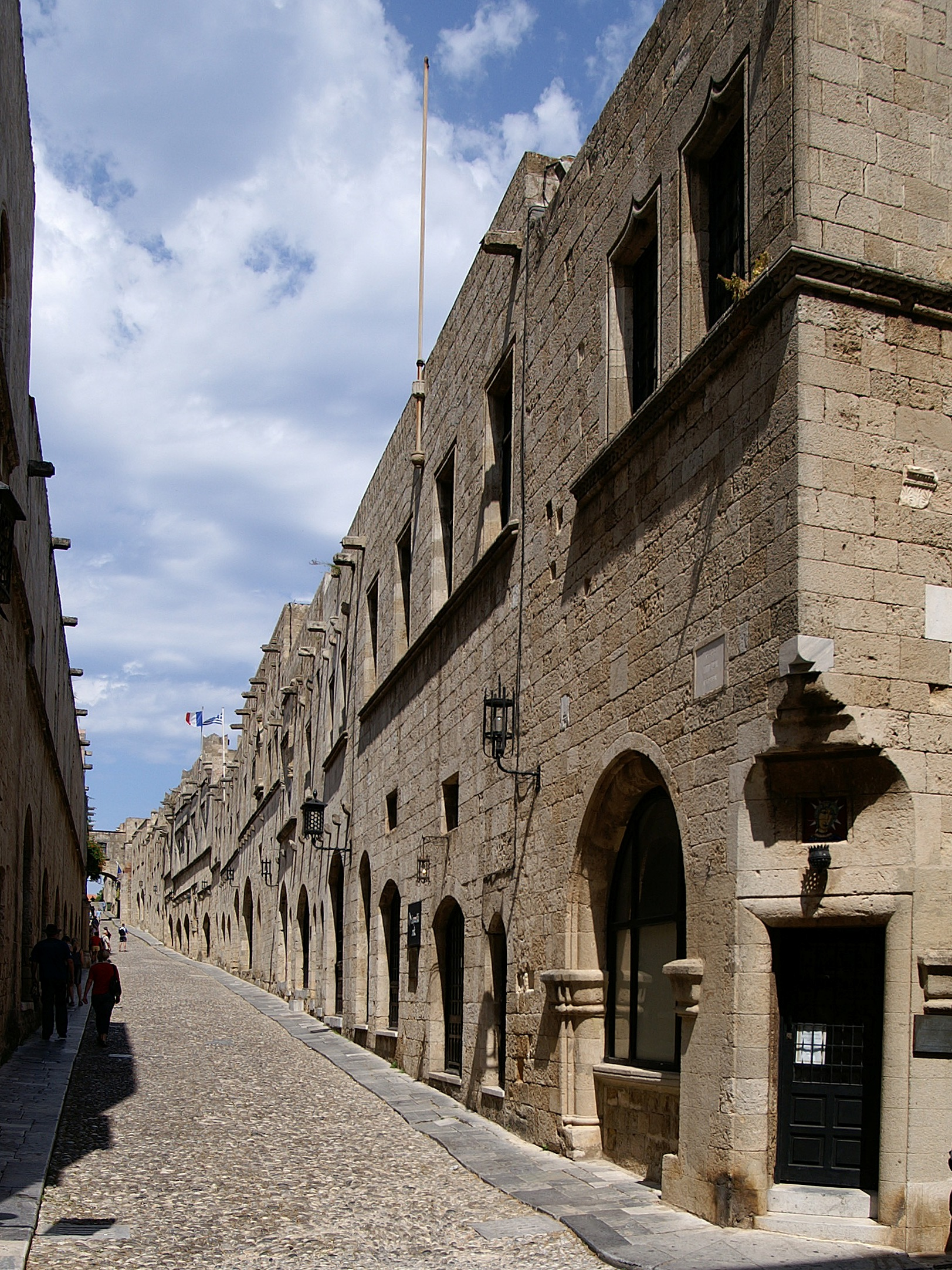 Gasse in der Altstadt von Rhodos.Street of the Knights